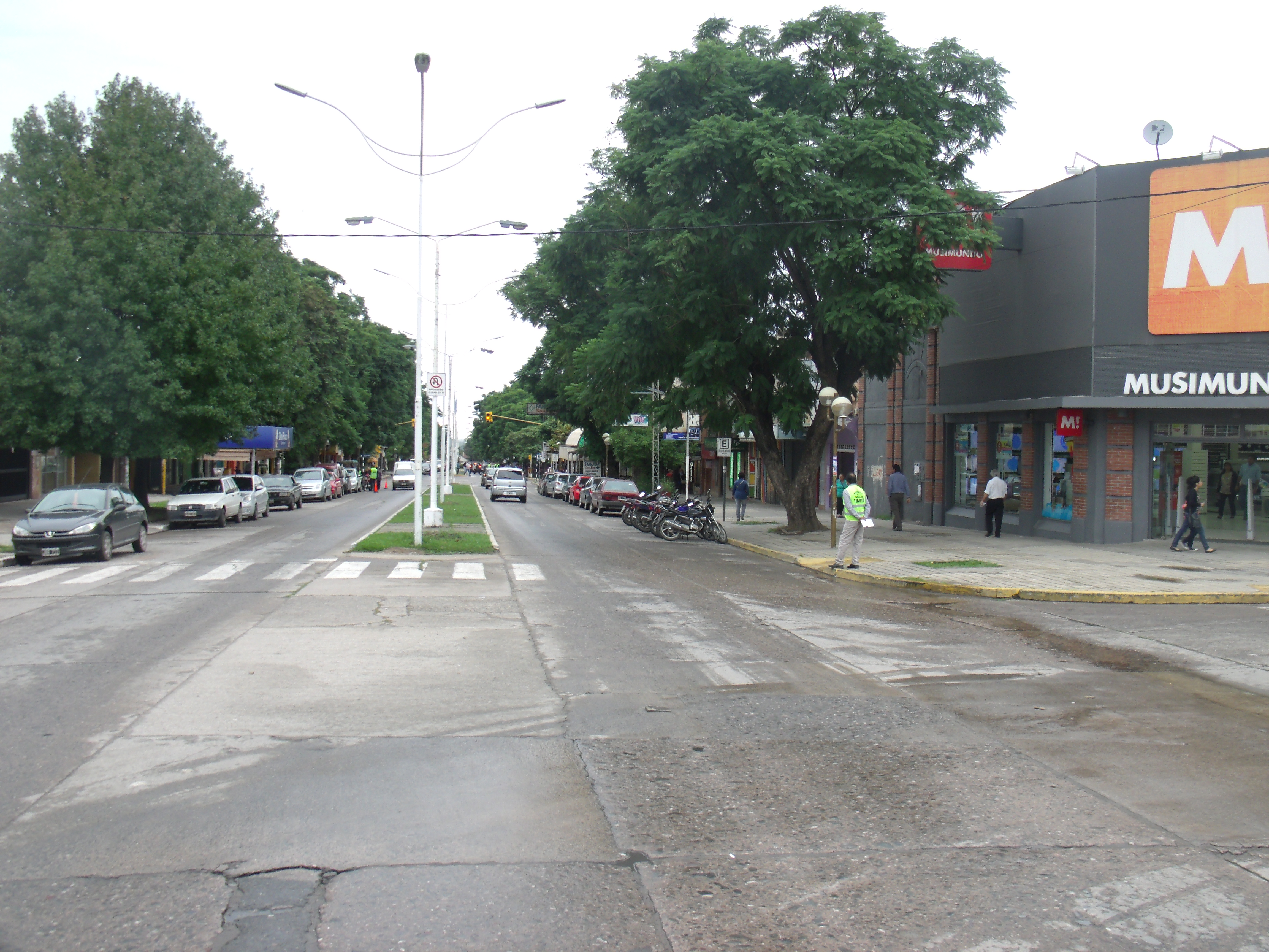 Vista de la principal avenida comercial de Tafí Viejo, se aprecia cartel de la empresa Musimundo.